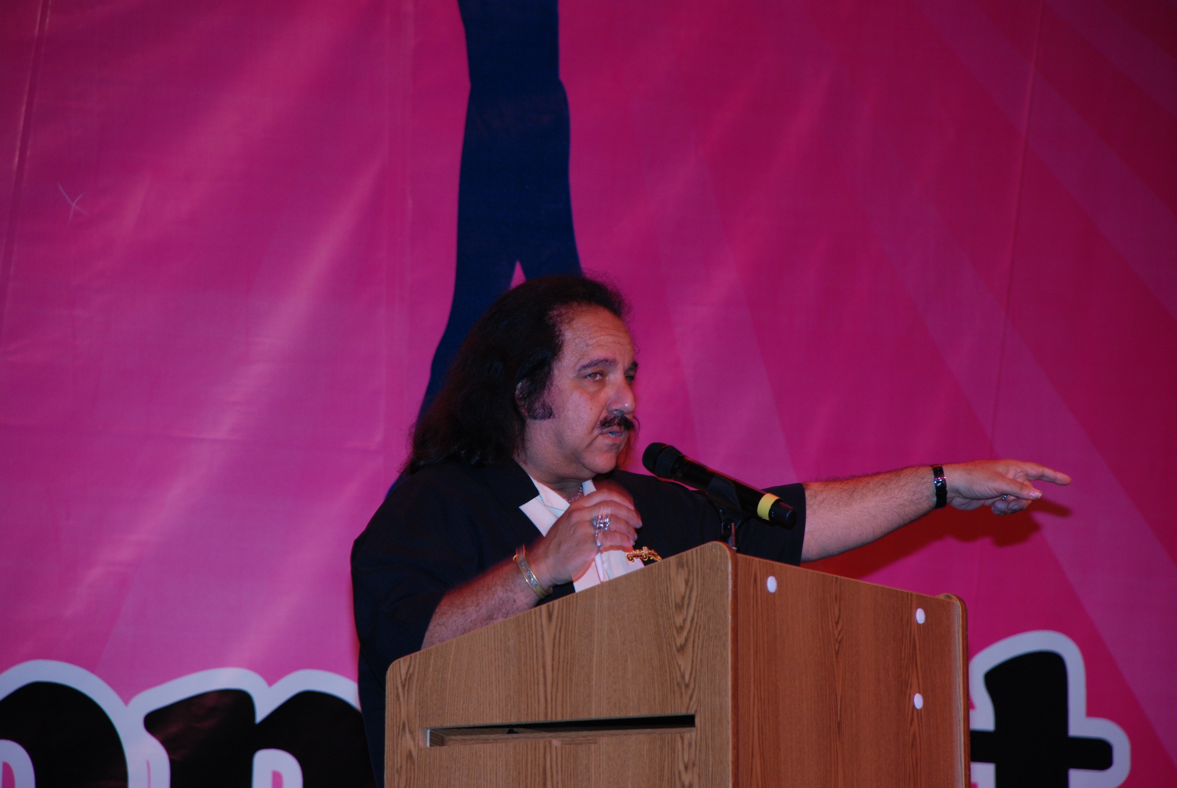 Miami Eroticaxxx 5-9-09 Nikon 041